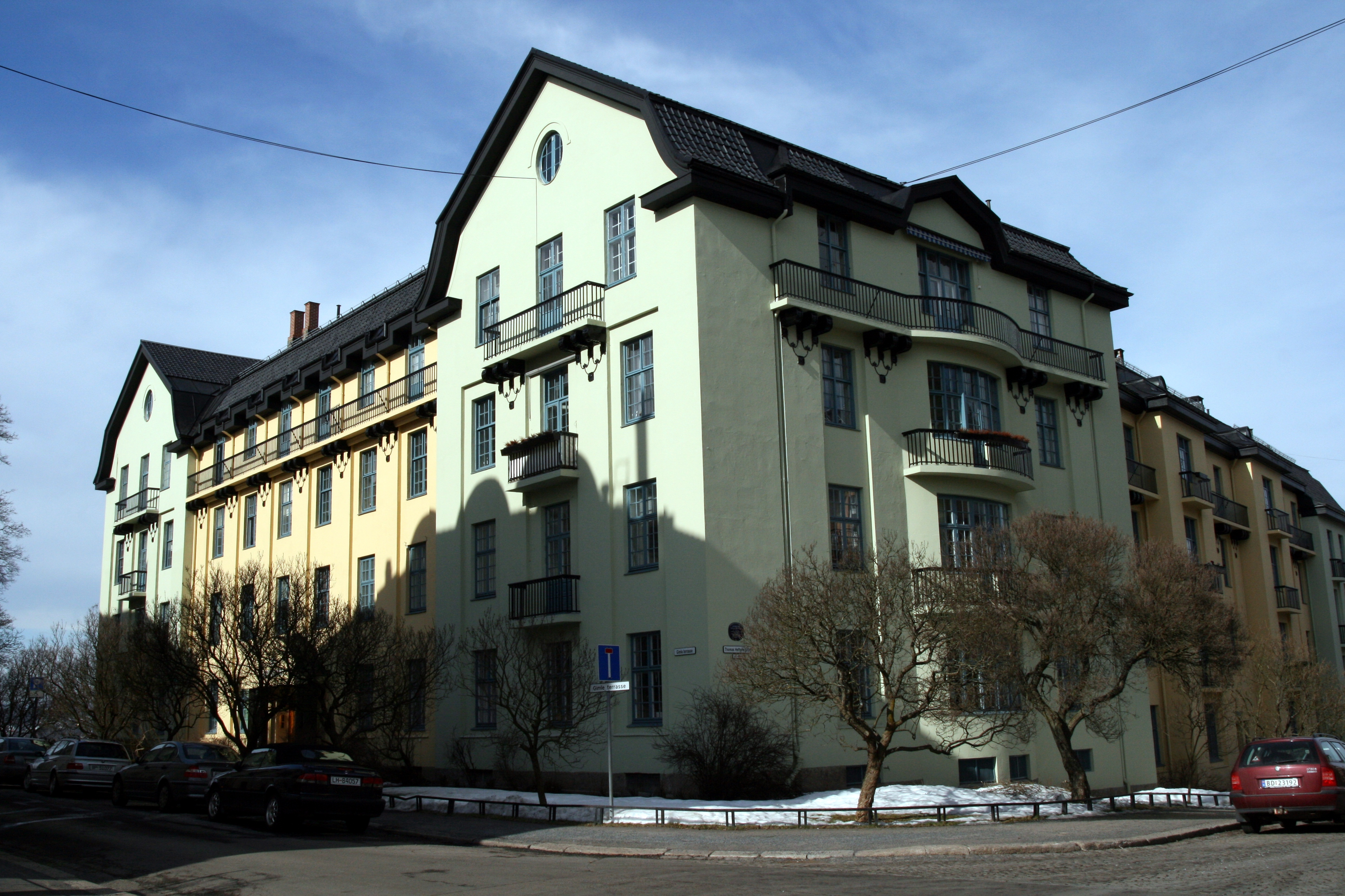 Thomas Heftyes gate 42-44 i Oslo, kjent som «Heftyeterrassen». Bygningen ble oppført 1911-13, og ble gjennombruddet til Norges første kvinnelige arkitekt, Georgine Lilla Hansen.